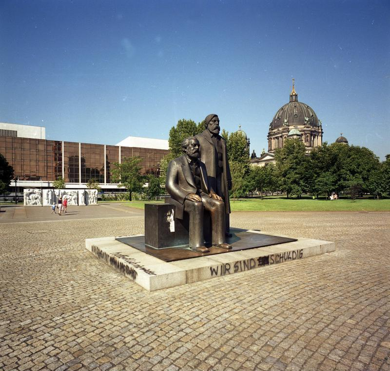 22.7.1991 Berlin-Mitte Marx-Engels-Denkmal vor dem Palast der Republik